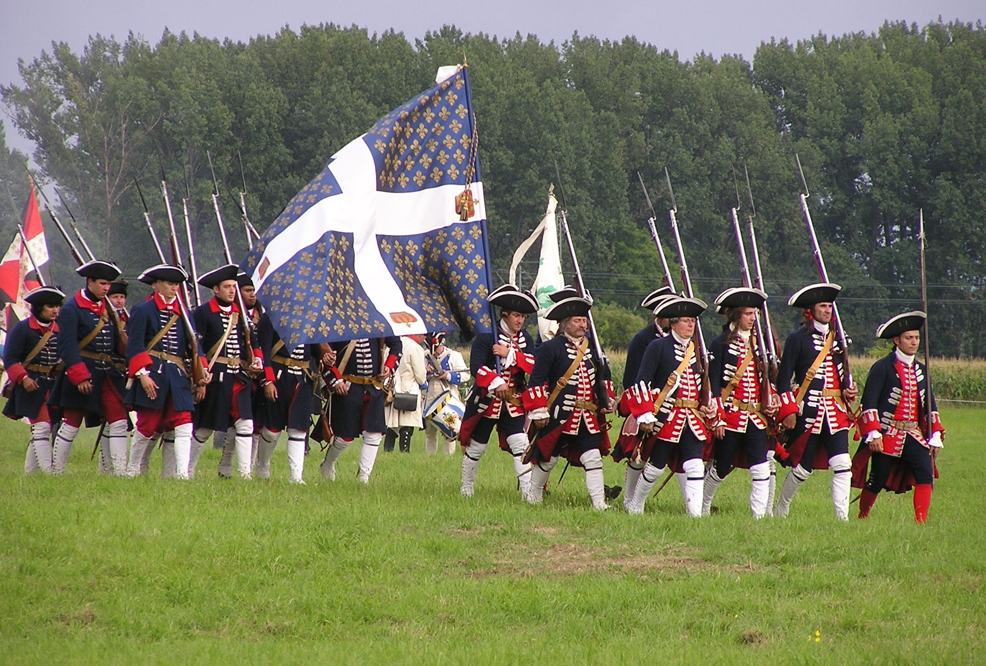 Schlacht bei Minden, 250 jähriges Jubiläum (Régiment Gardes francaises)